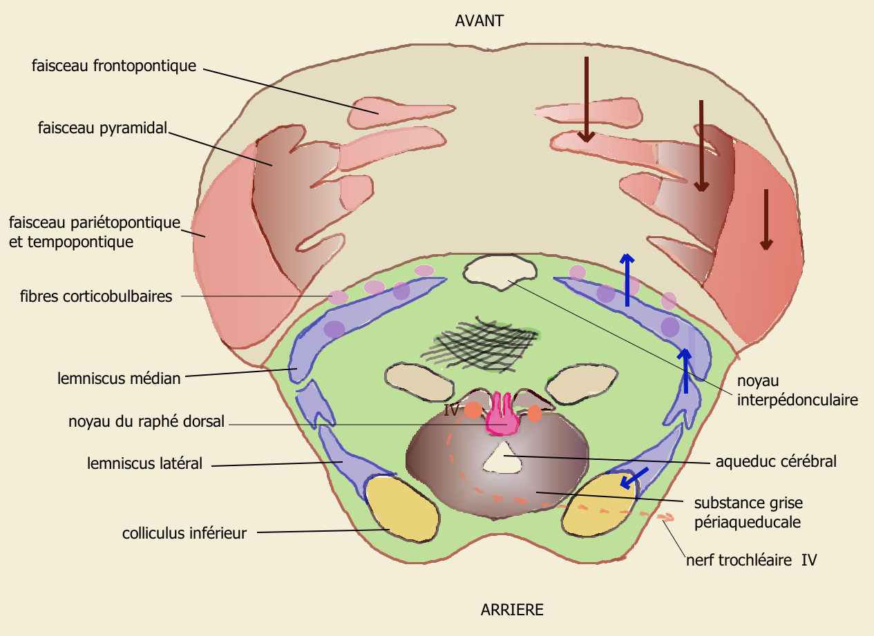 Mésencéphale, coupe au niveau de la jonction pontomésencéphalique